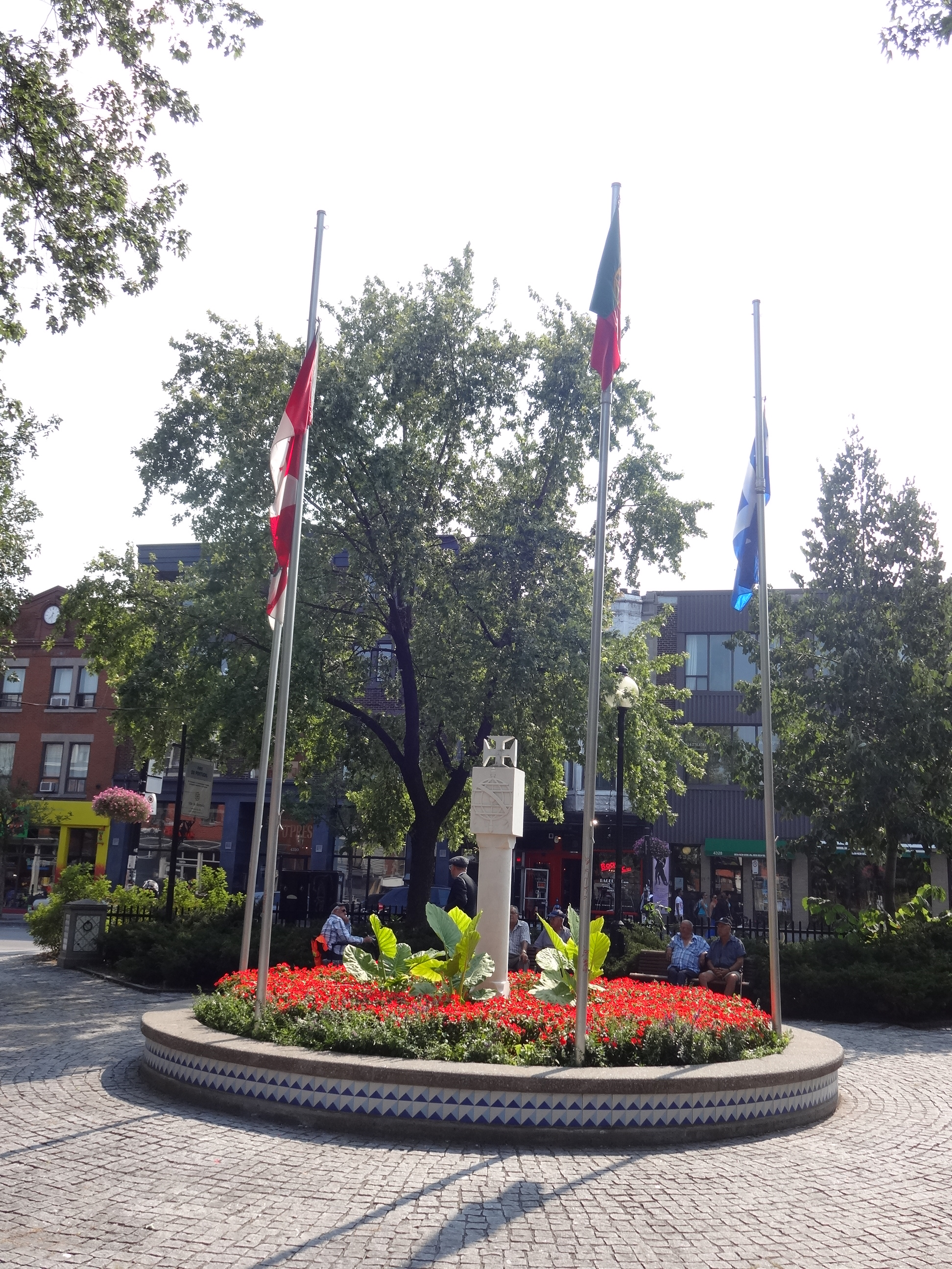 Monumento do Parc du Portugal, Montreal.